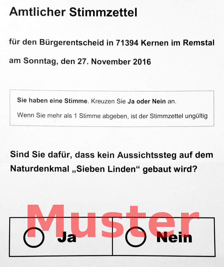 Wahlzettel zum Bürgerentscheid zum Aussichtssteg bei den Sieben Linden.